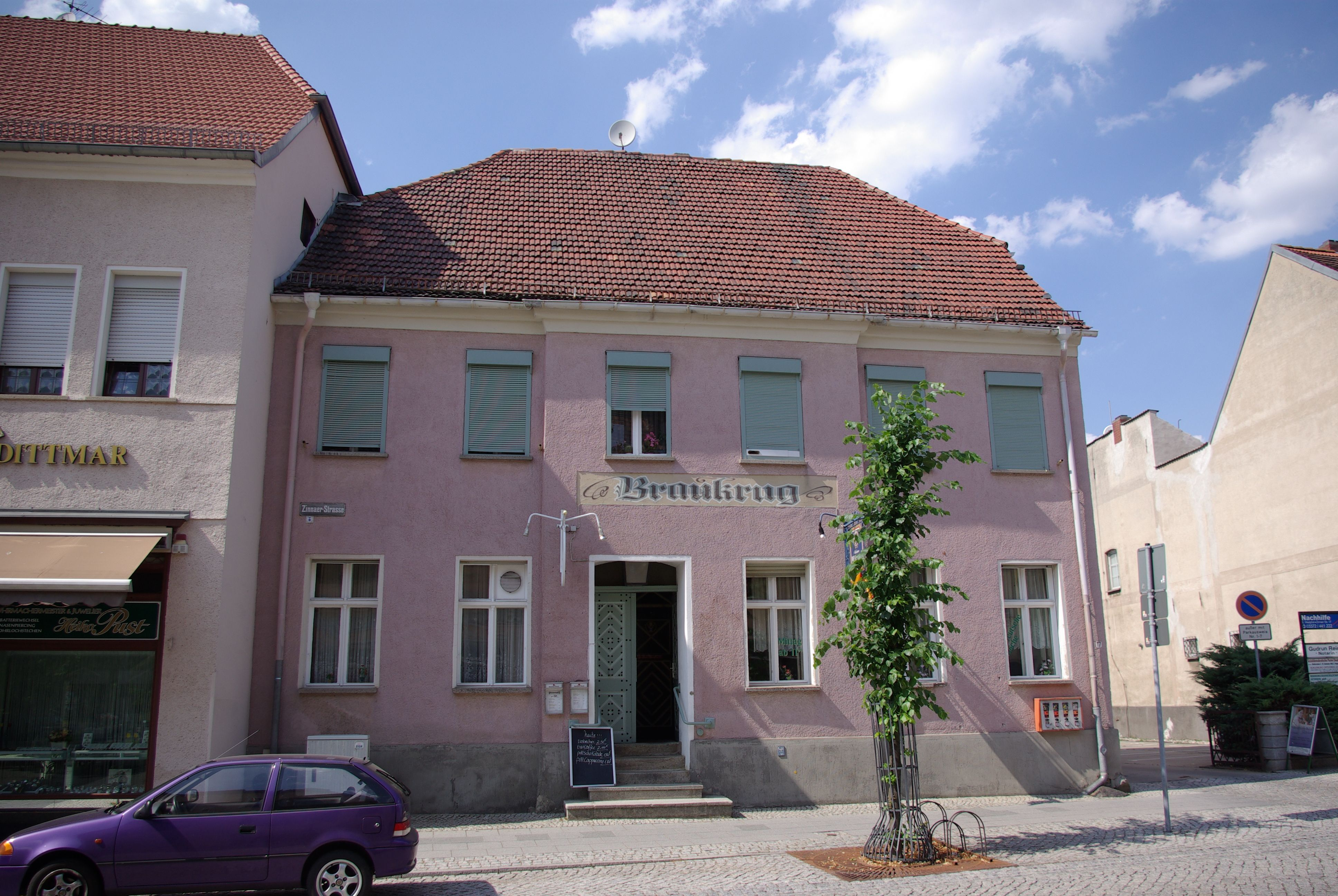 Jüterbog in Brandenburg. Das haus in der Jüterboger Straße 17 steht unter Denkmalschutz.